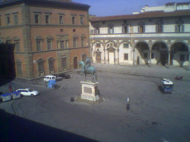 Piazza Santissima Annunziata square, side view, in Florence, Italy